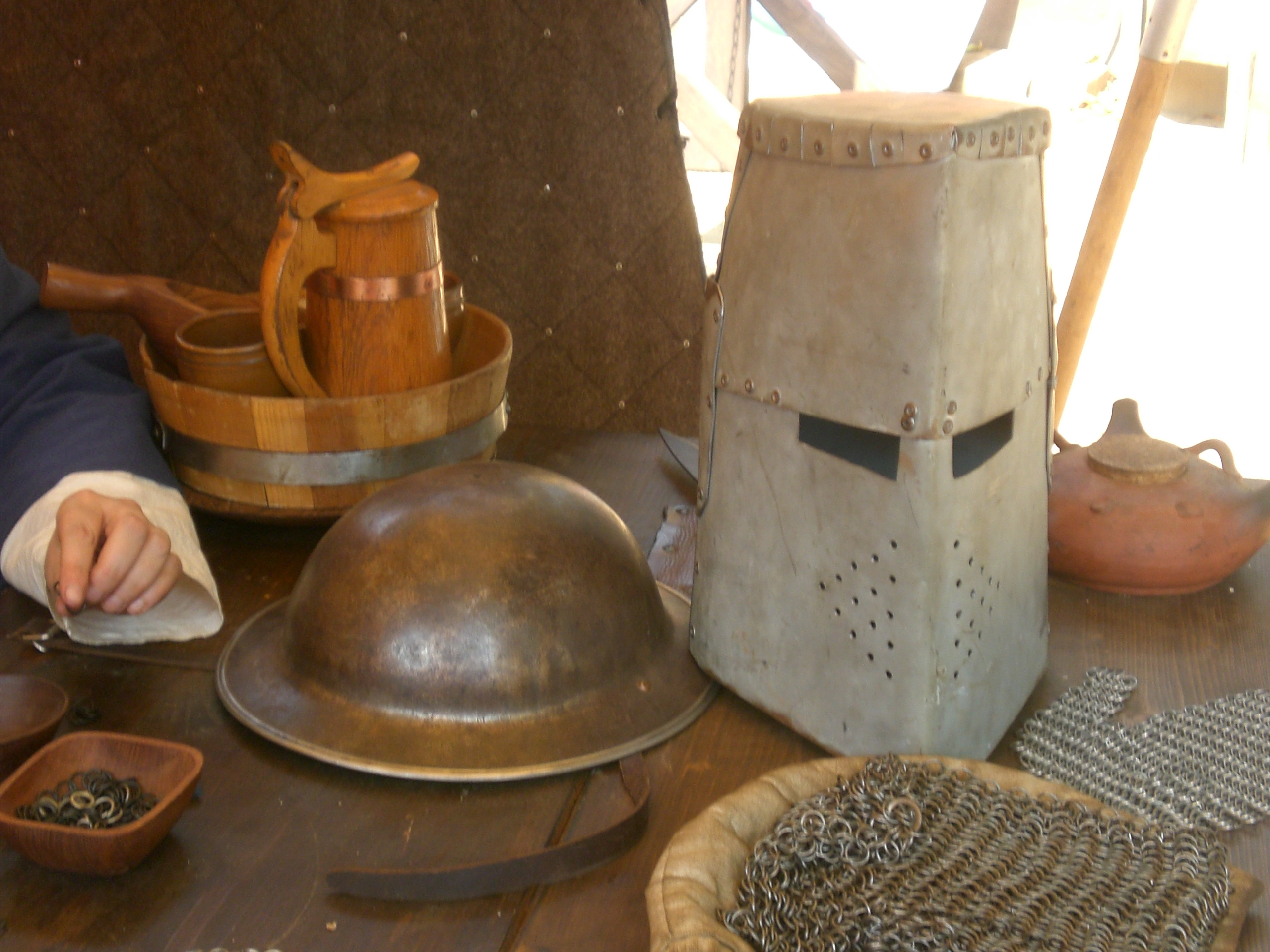 kaskoj en mezepoka festo sur la kastelo de Alsbach, Bergstraße (Germanio)